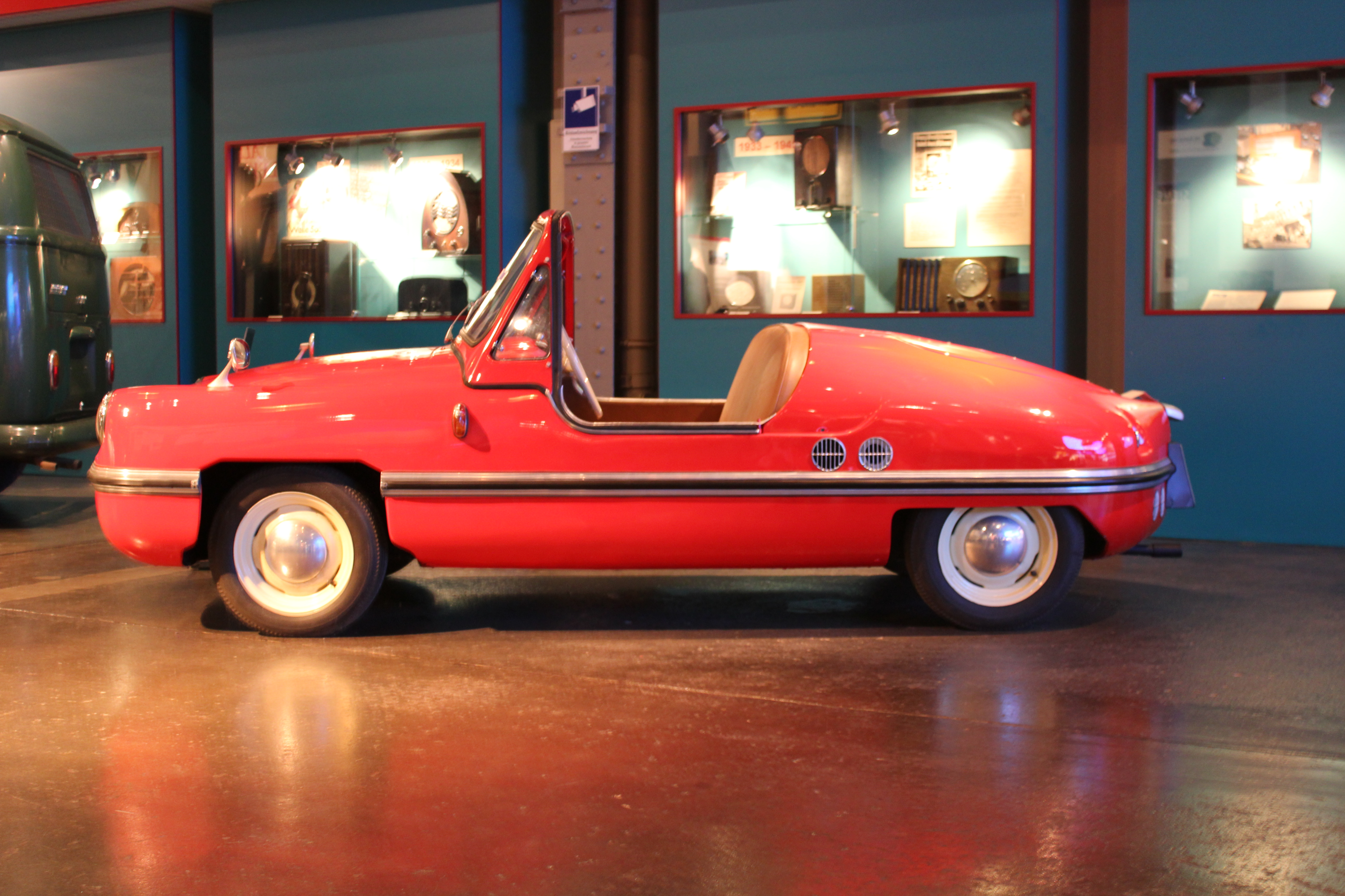 Exponat Museum Industriekultur Nürnberg